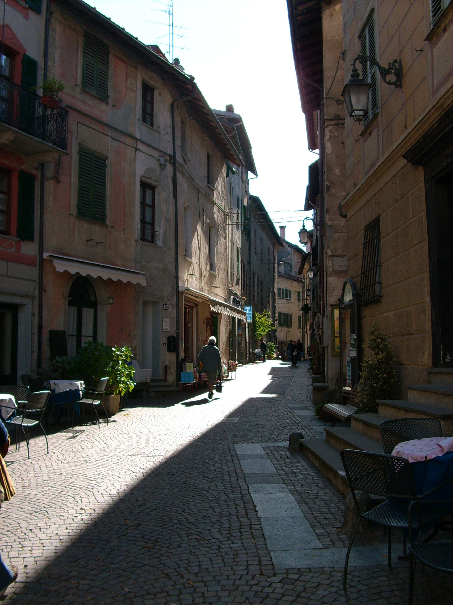 Centro storico di Sassello, Liguria, Italia